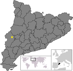 Localització de Lleida. Location of Lleida in Catalonia.